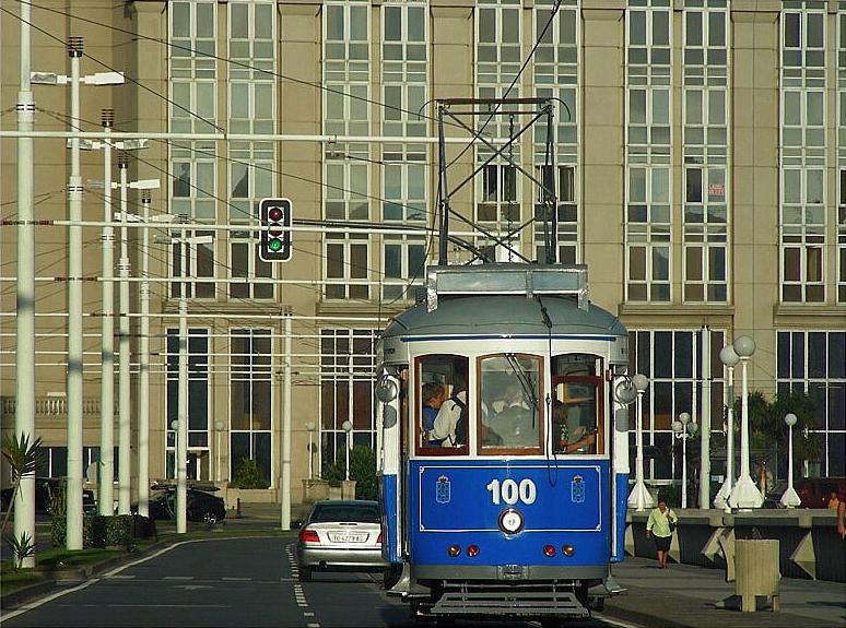 Tranvía. Orzán, A Coruña